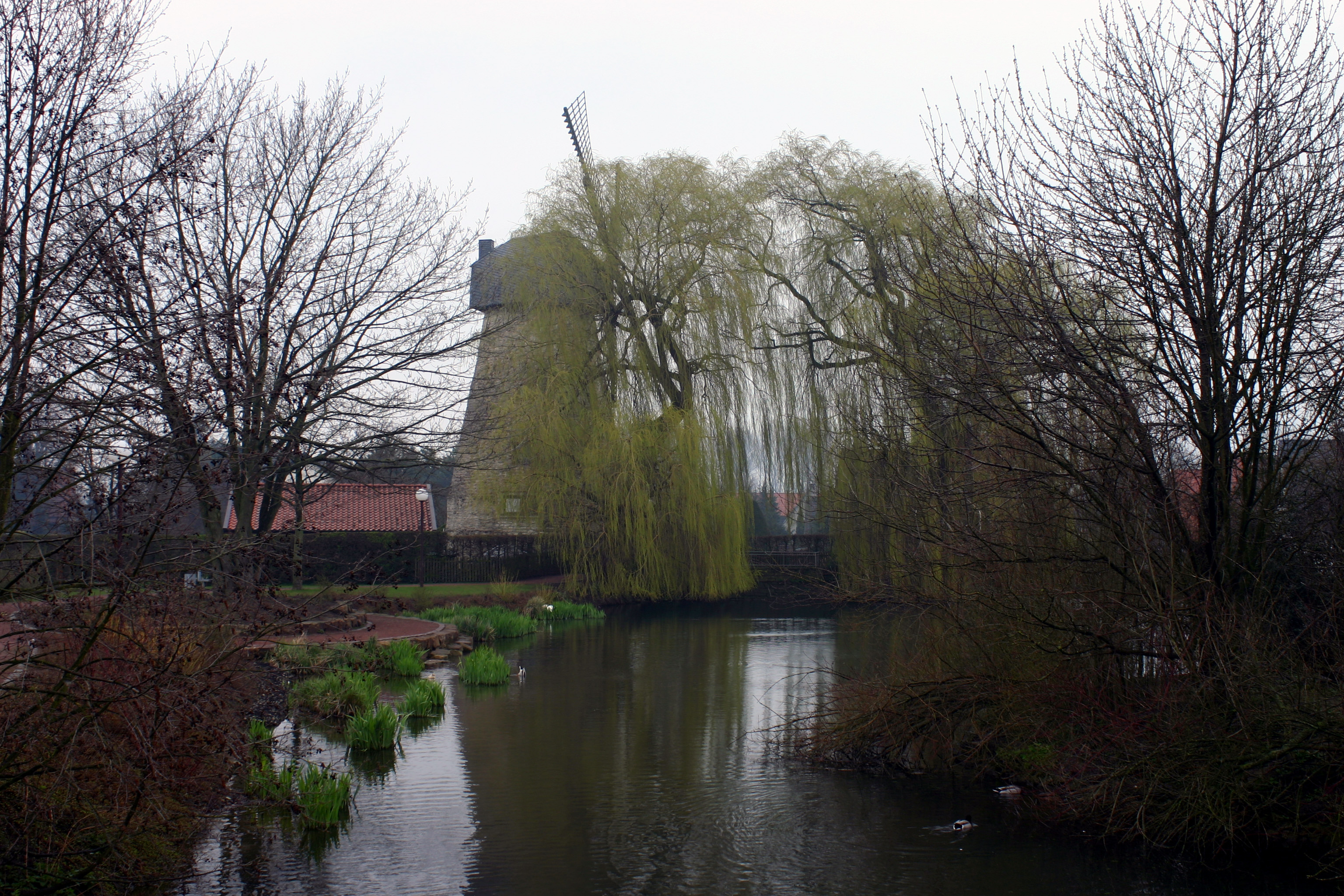 Rathausteich mit Kappwindmühle